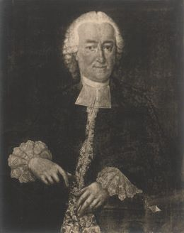 Friedrich Wilhelm Tafinger (1726 - 1777), deutscher Jurist, 1749 Dr. iur., 1753-1777 Prof. der Rechte, 1765, 1771 und 1775/76 Rektor (PND: 117196959). Historisches Foto eines Gemäldes von [Matthias Heinrich ?] Schnürer, Professorengalerie, Universität Tübingen, Inventar: 97/266a.